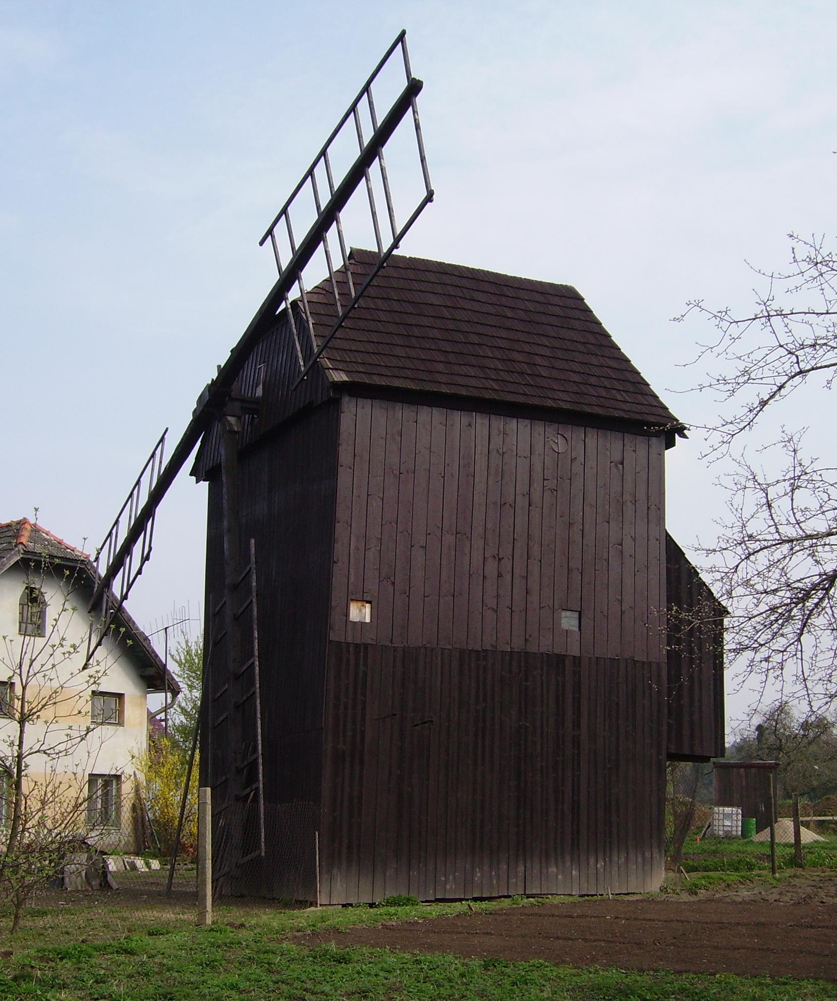 Skalicka01_Windmill.JPG